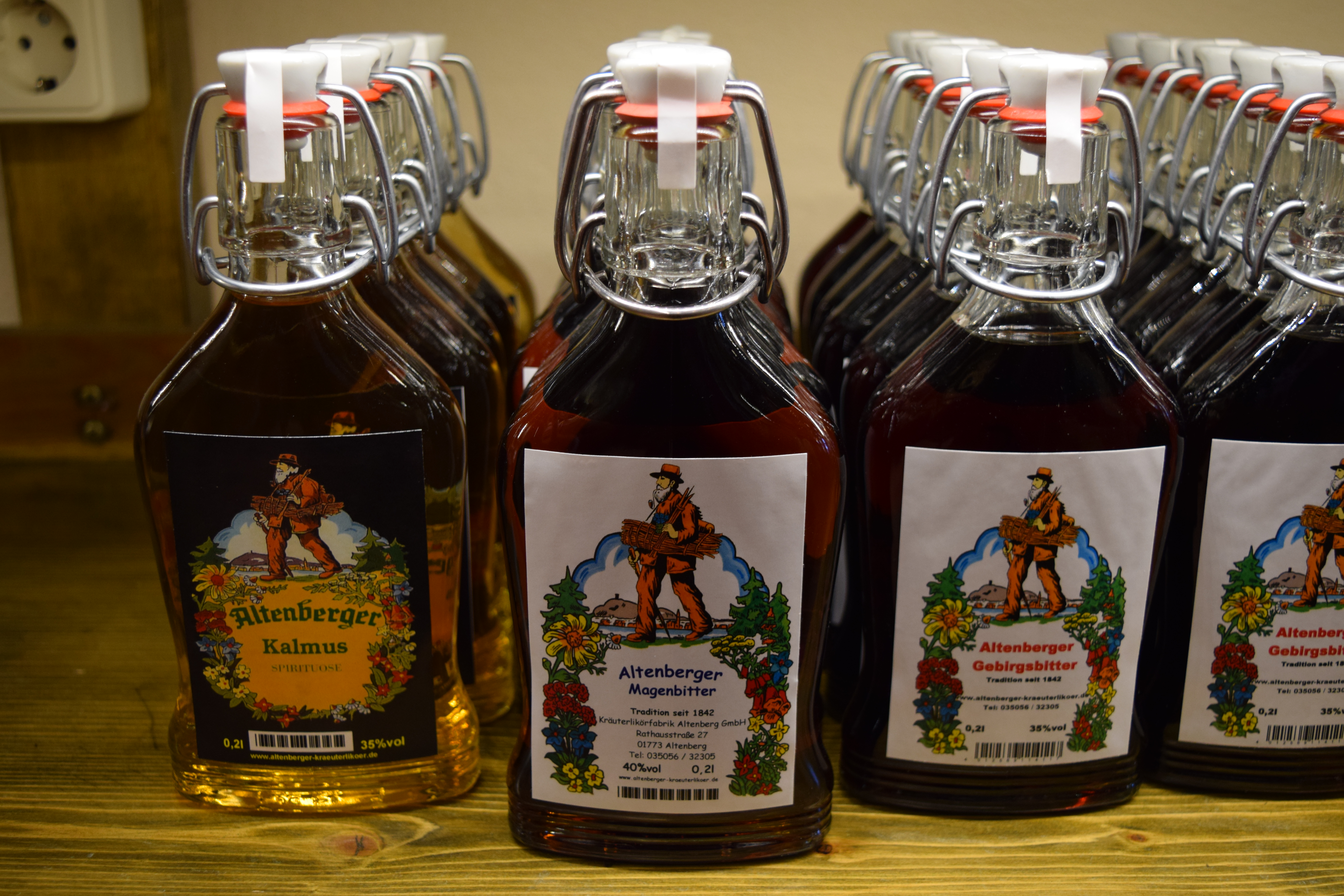 Altenberger Kalmus, Magenbitter, Gebirgsbitter